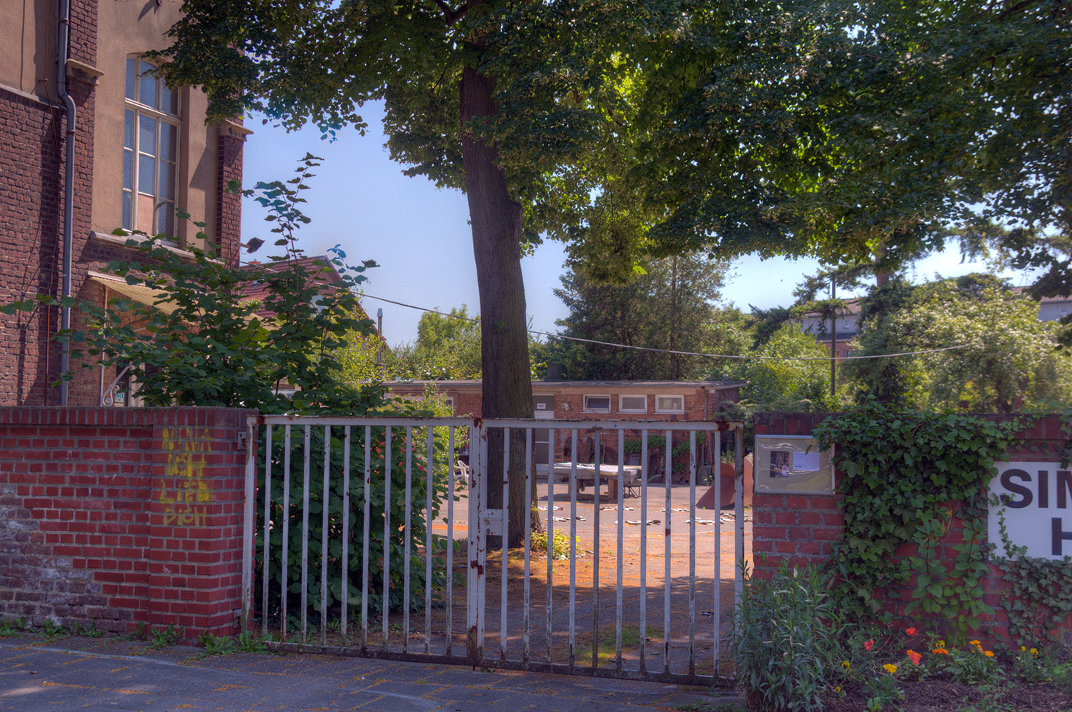 Volksschule Volkhoven, Volkhovener Weg 209–211. Zur Zeit des Attentats (1964) waren im Hof zusätzlich Baracken als Schulräume aufgebaut This is a photograph of an architectural monument.